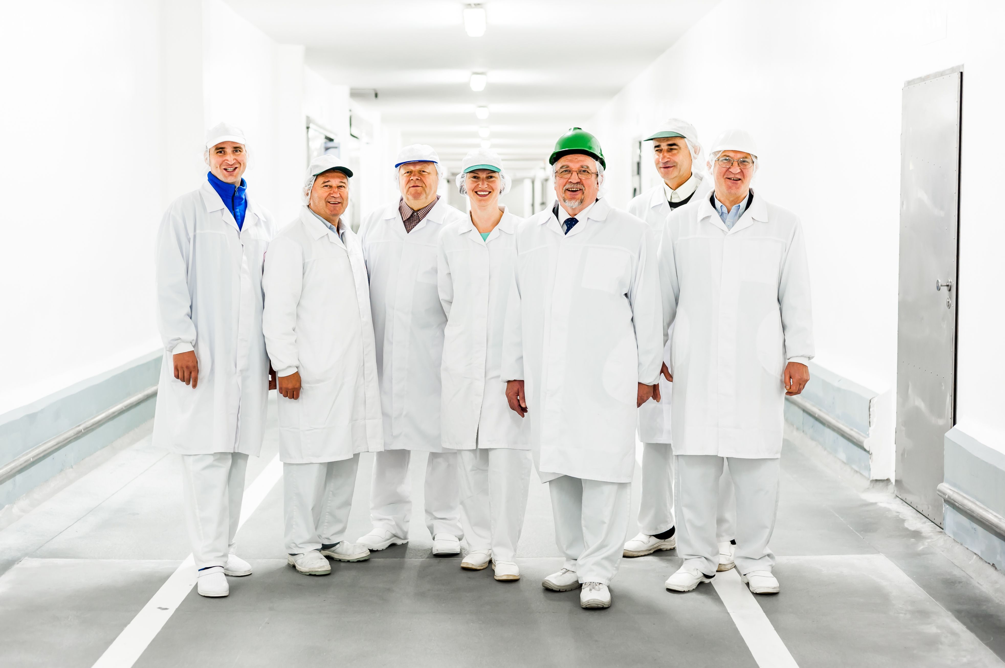 Sokołów SA - Czyżew, produkcja